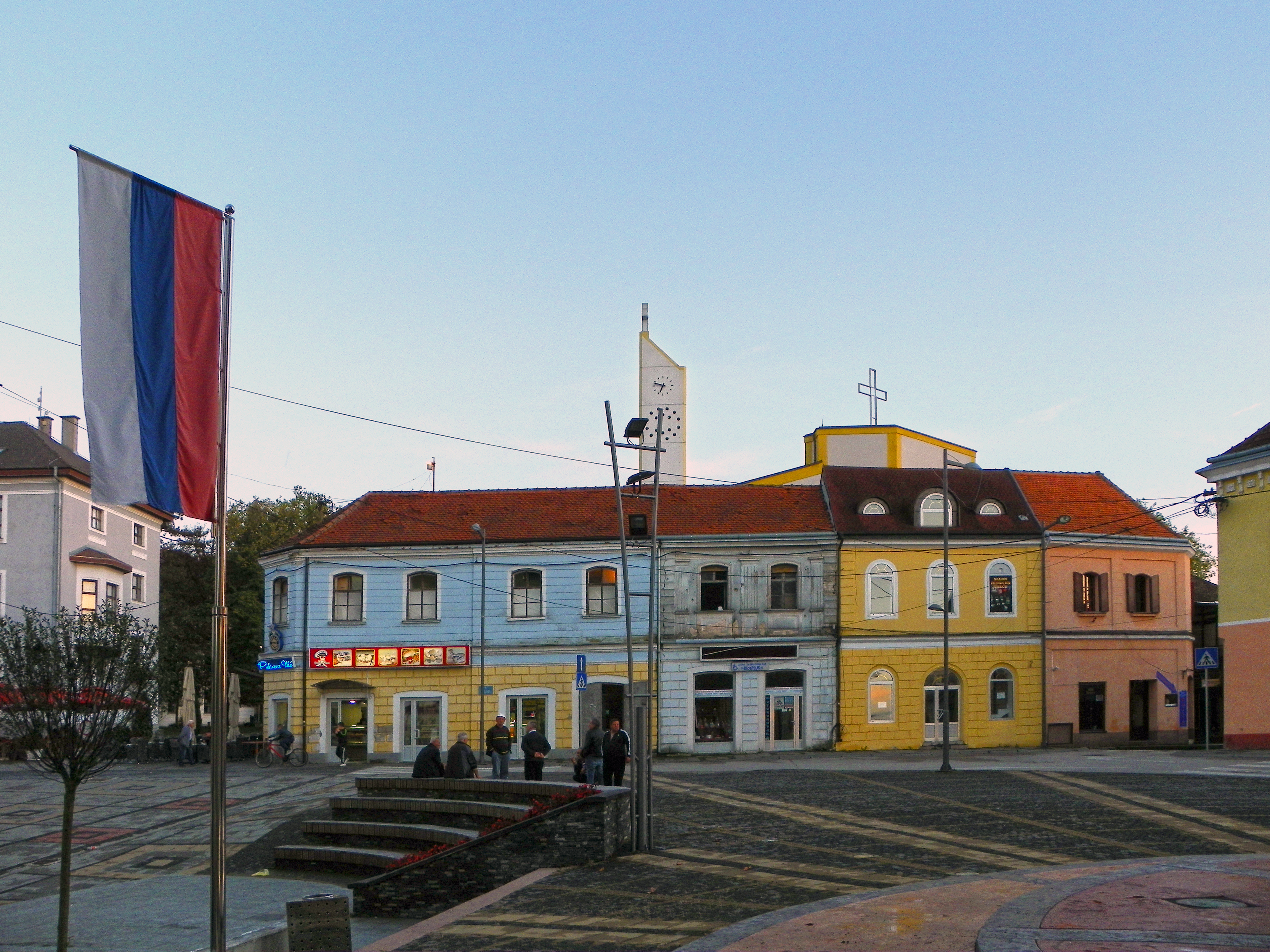 Трг православља у Дервенти